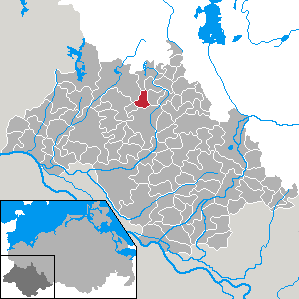 Hülseburg in Mecklenburg-Vorpommern - district Ludwigslust